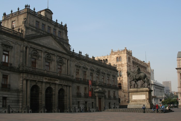 Plaza Manuel Tolsá, en la Ciudad de Mexico. En primer plano, la estatua ecuestre de Carlos IV, conocida popularmente como "El Caballito" y el Palacio de Minería. Detrás, el Palacio Postal y la parte trasera del Palacio de Bellas Artes